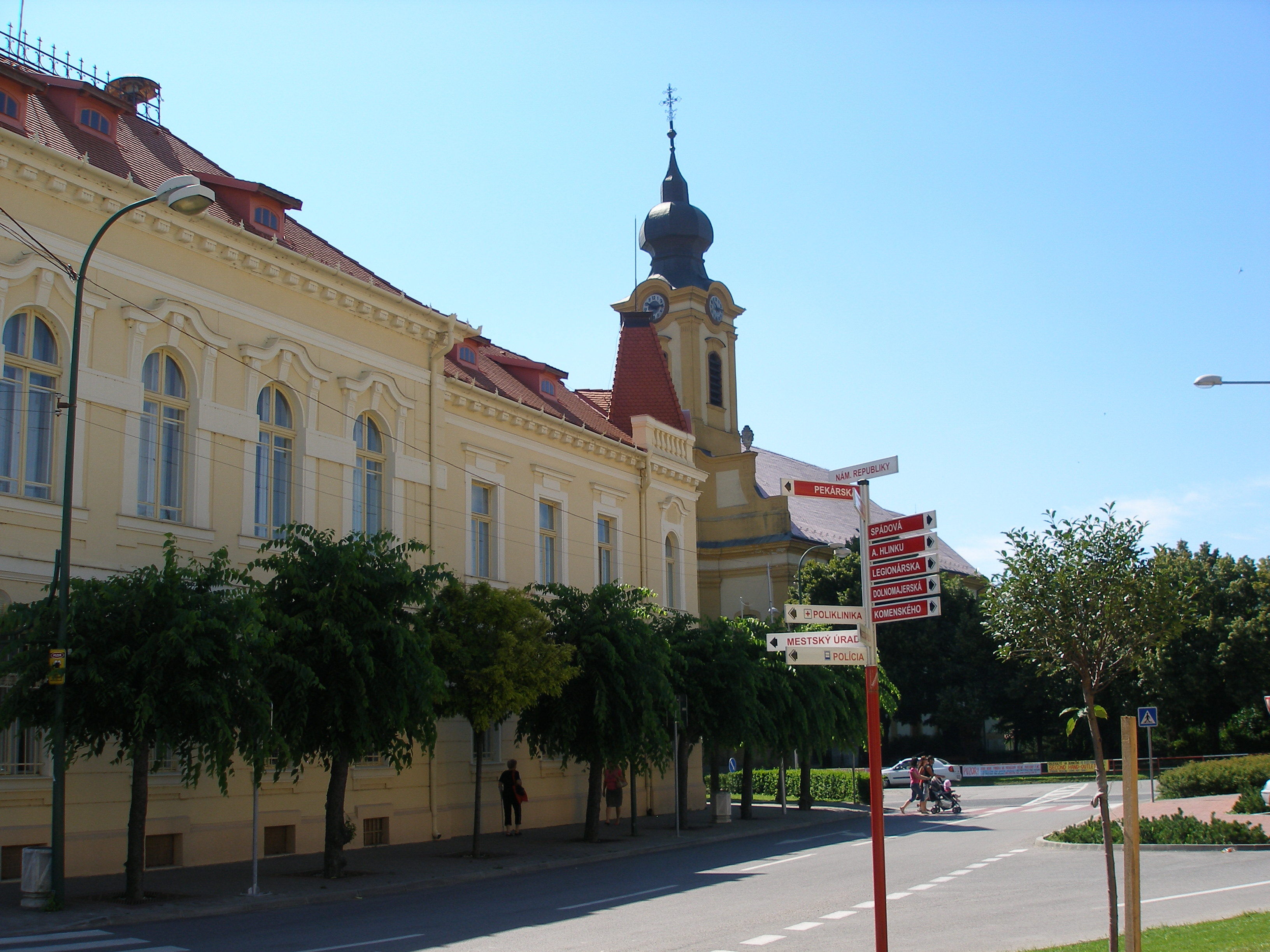 Pohľad na Kostol a mestský úrad